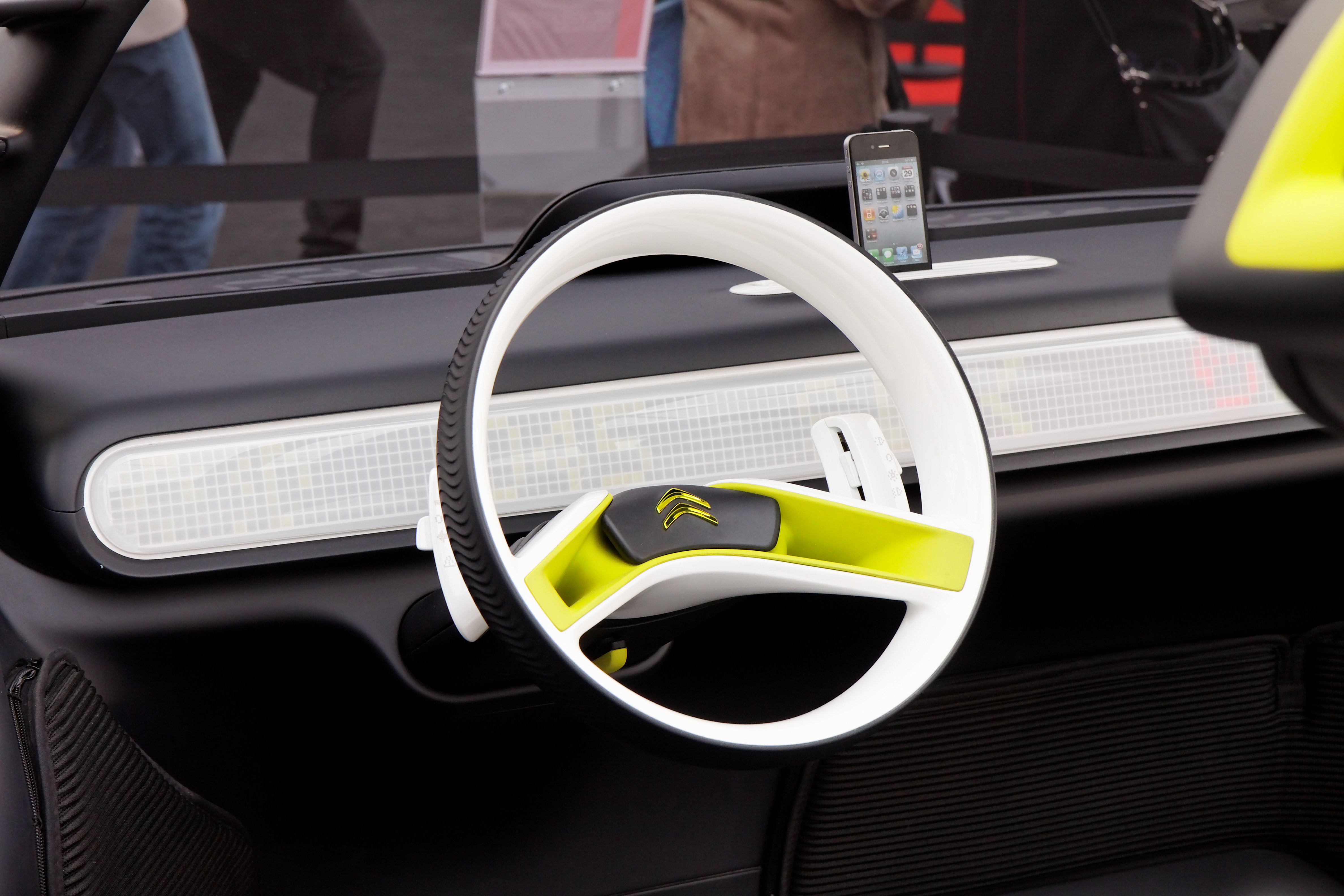 La Citroën Lacoste exposée devant le dôme des Invalides lors du festival automobile international 2011.